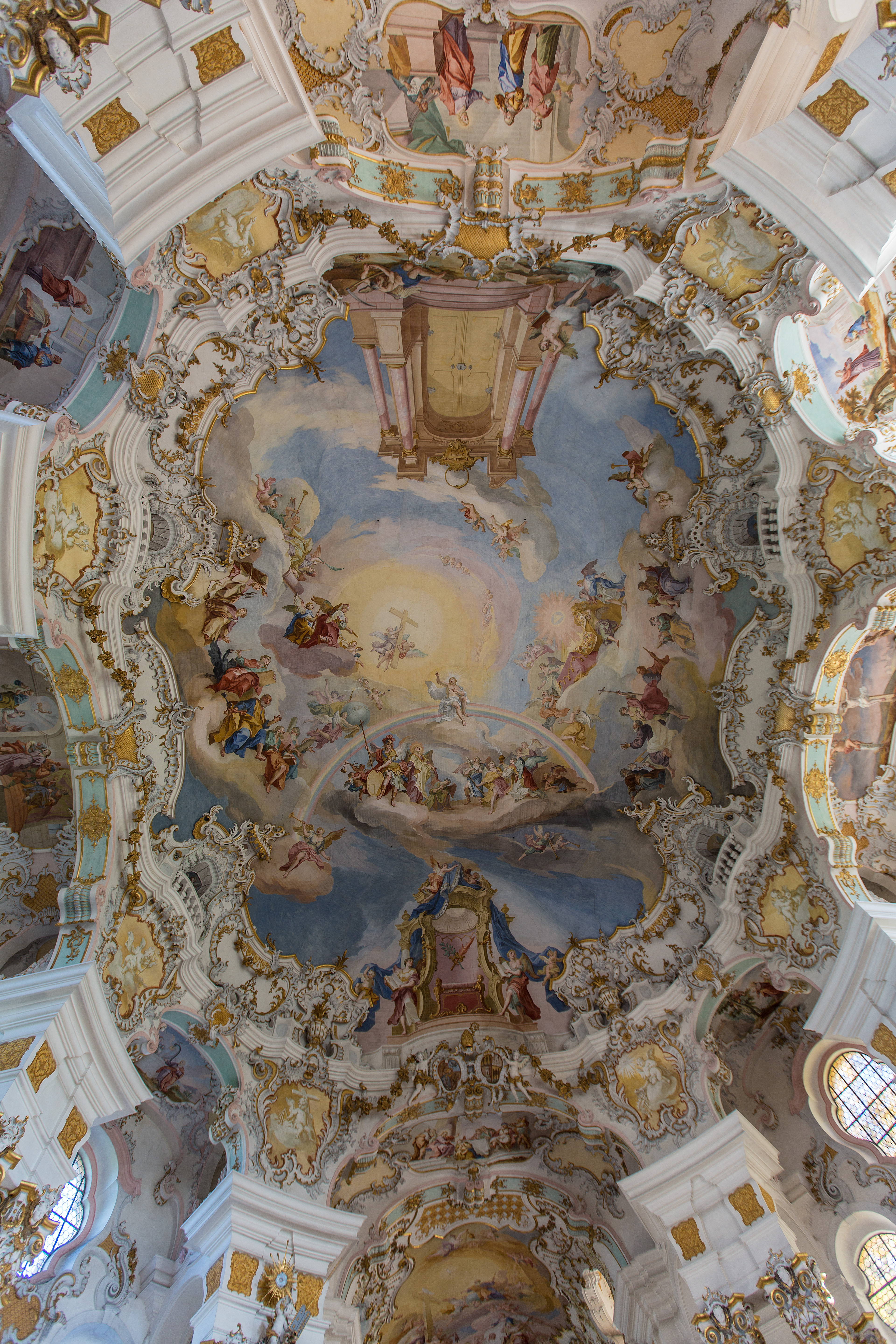 Fresko der abgeflachten Kuppeldecke in der Wieskirche von Johann Baptist ZimmermannThis is a photograph of an architectural monument.